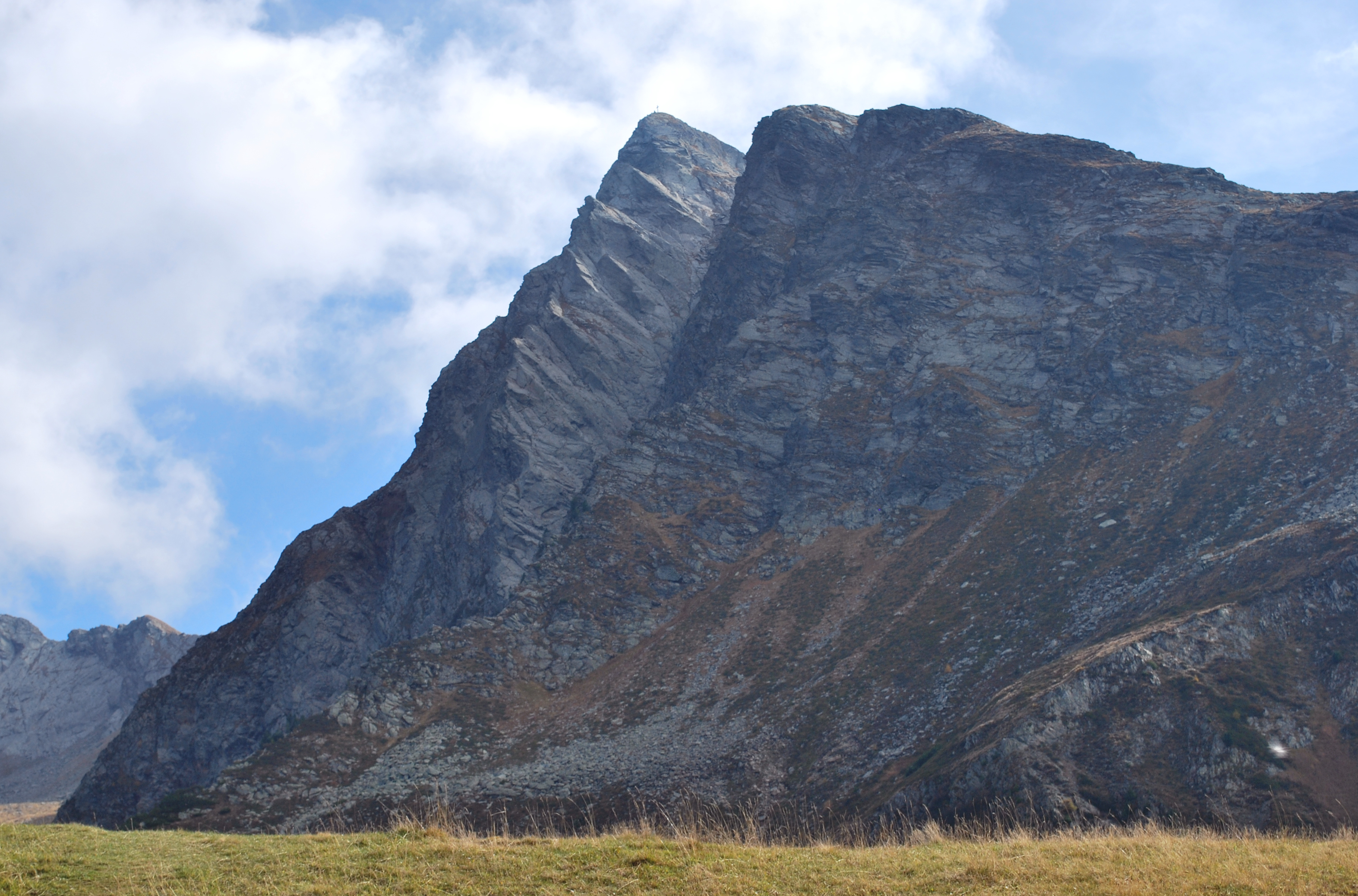 Jaufenspitze von NW (Jaufenhaus)